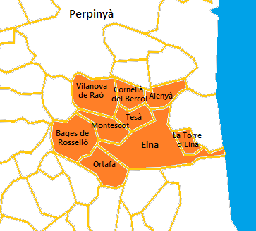 Mapa del Cantó de la Plana d'Illiberis elaborat a partir d'un mapa de lliure distribució